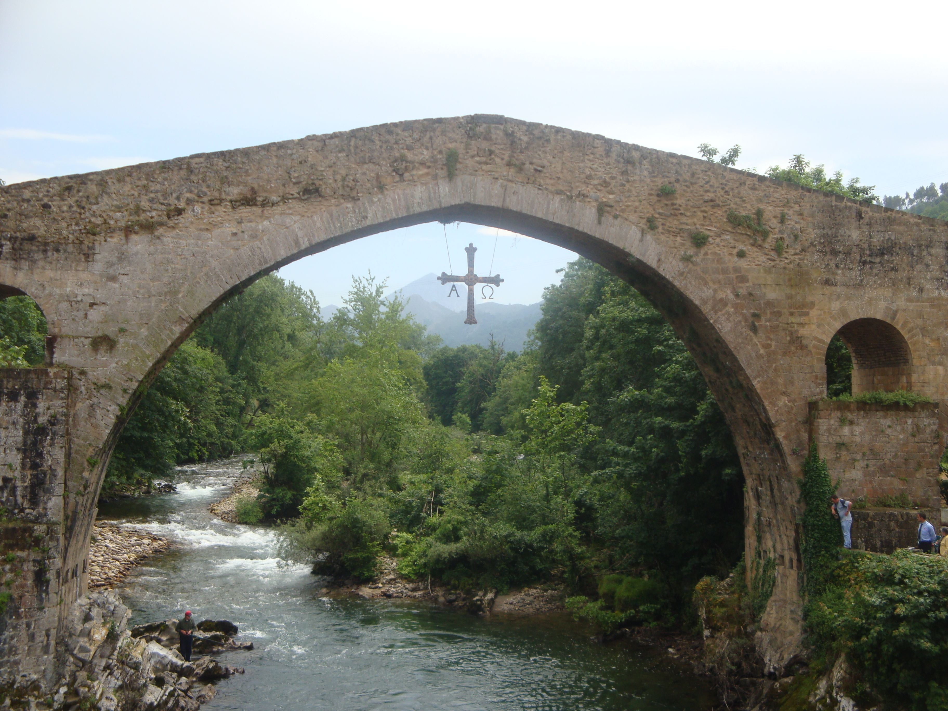 Puente de Cngas de Onís Asturias